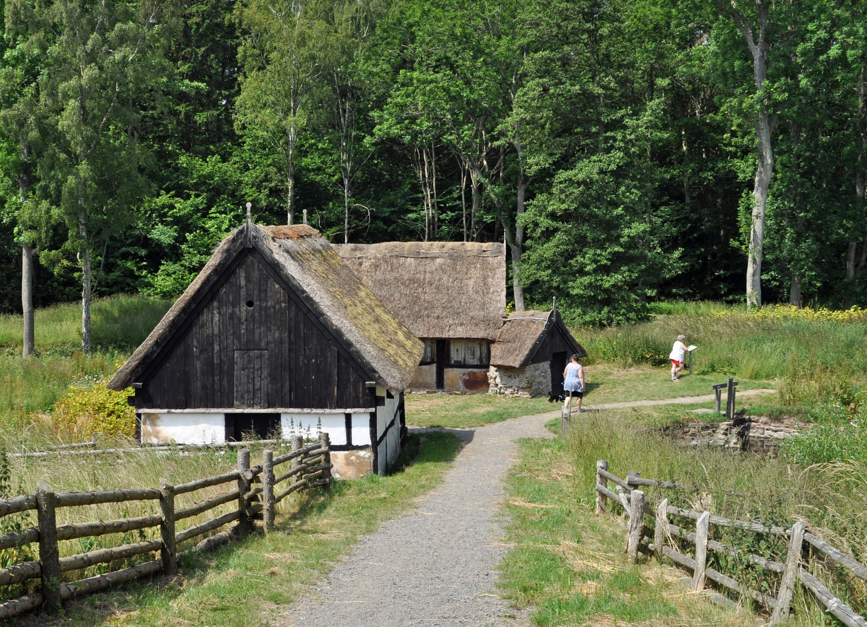 Slusegård, Bornholm (2012-07-05), by Klugschnacker in Wikipedia (1)